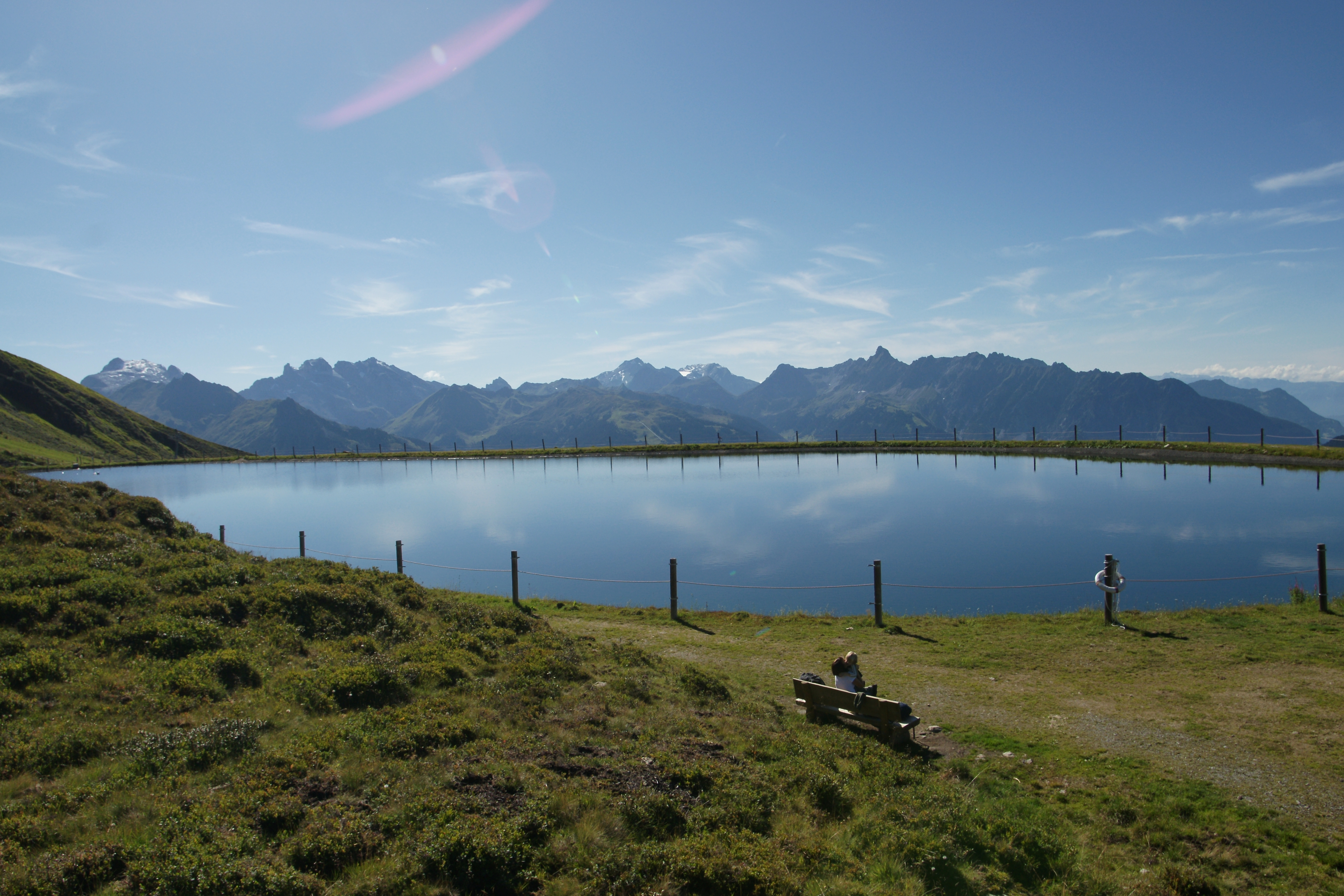 Neben dem Sauerbleis 1985m liegt der Speichersee Hochjoch. Er liegt unter dem gleichnamigen Hochjoch (2520m) und dient im Winter den Beschneiungsanlagen für das Skigebiet.